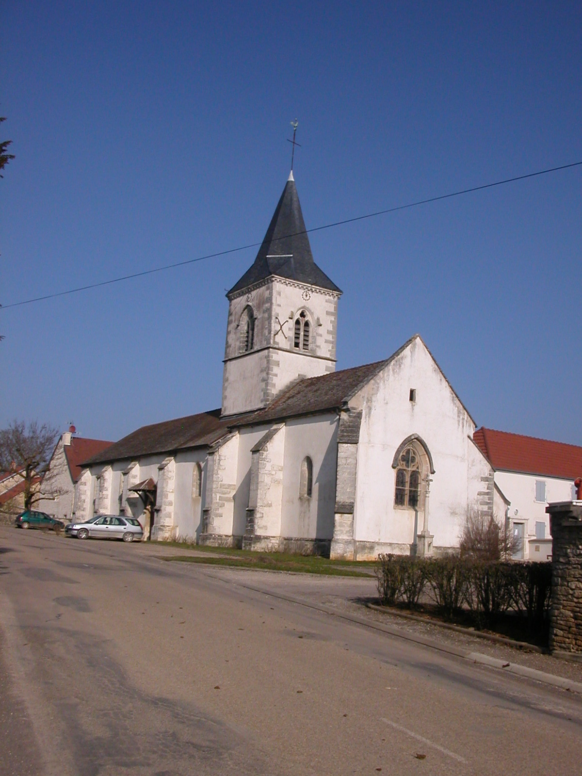 église de MARSANNAY LE BOIS (côte d'or)